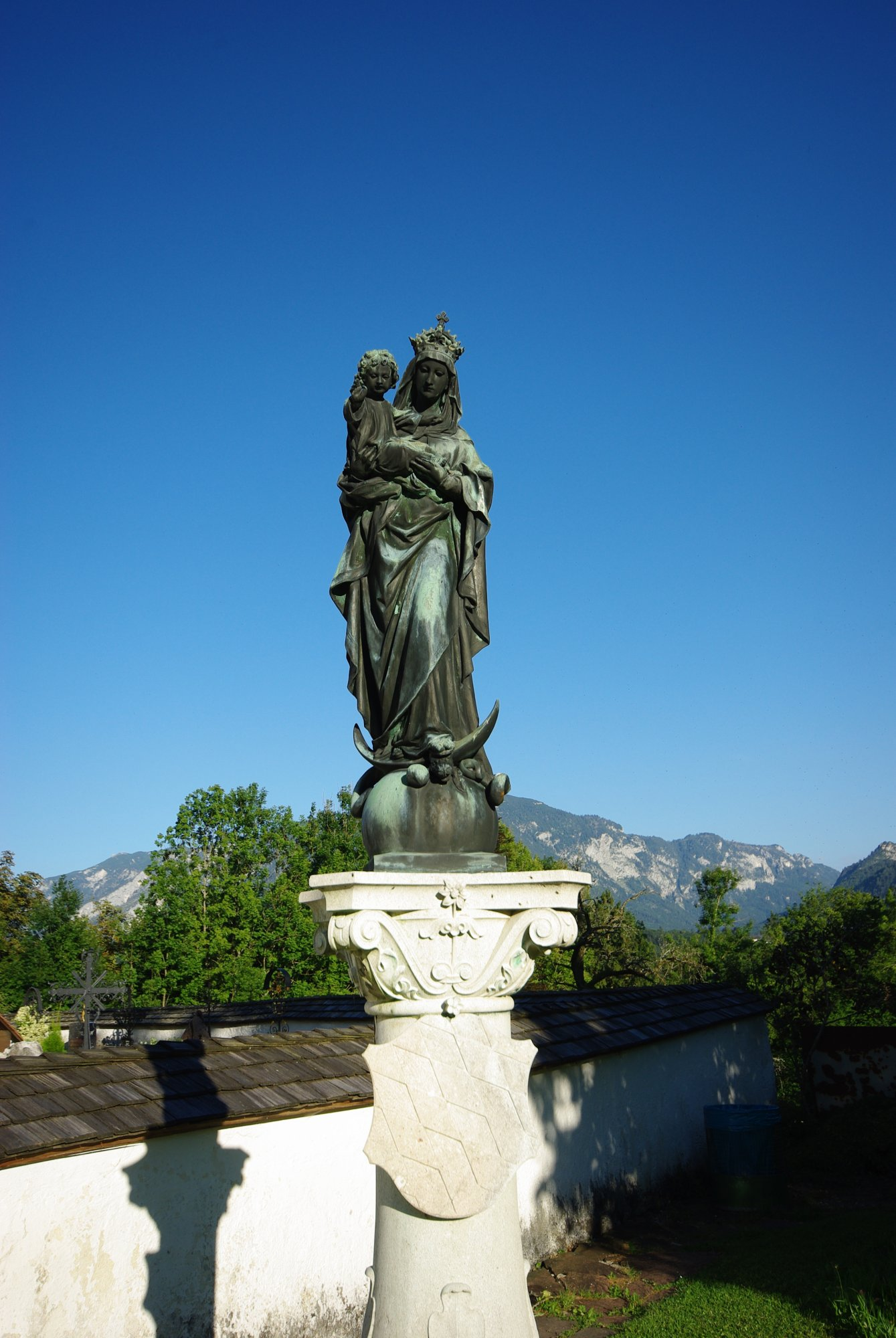 Nonn 44, 83435 Bad Reichenhall Kath. Pfarrkirche St. Georg (Nonn) zugehörige Mariensäule von Paul Sayer, 1895This is a photograph of an architectural monument.